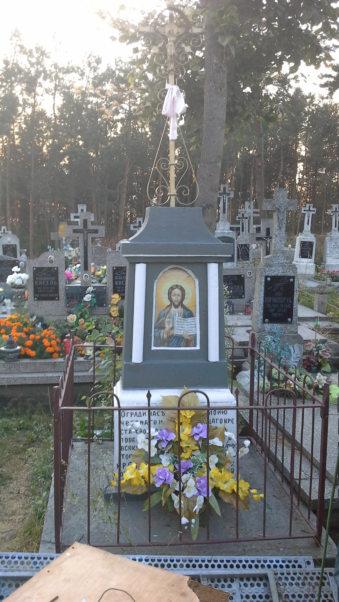 Kapliczka wotywna na cmentarzu prawosławnym w Rogawce